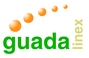 Logotipo GuadaLinex, distribución GNU Linux de Andalucía Logotipo del proyecto Guadalinex, 'subido' por Rutrus, procedente del logotipo oficial de Guadalinex, modificado con Gimp.